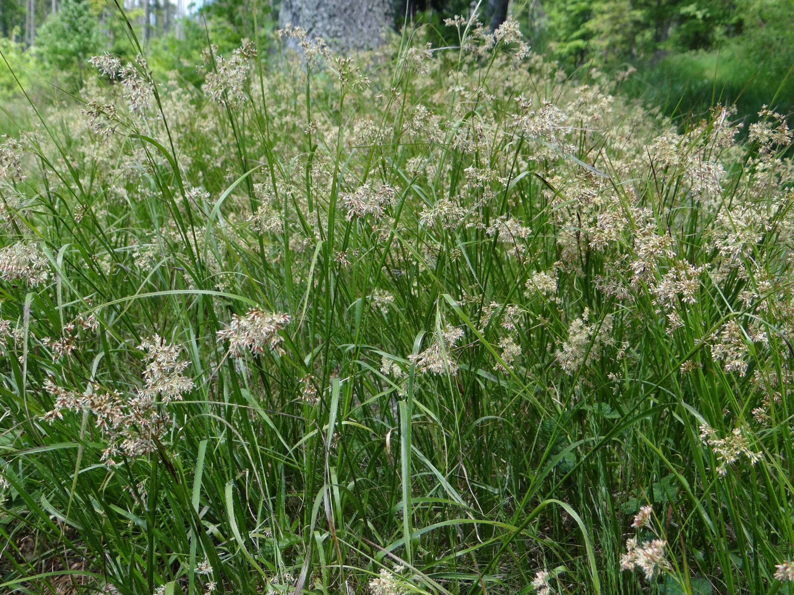 Luzula sylvatica (location: Poland, Beskid Żywiecki, Pasmo Policy, Okrąglica)